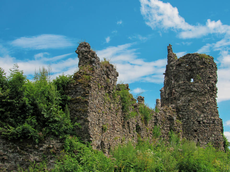 Руїни замку (мур.), Хуст, вул. Замкова